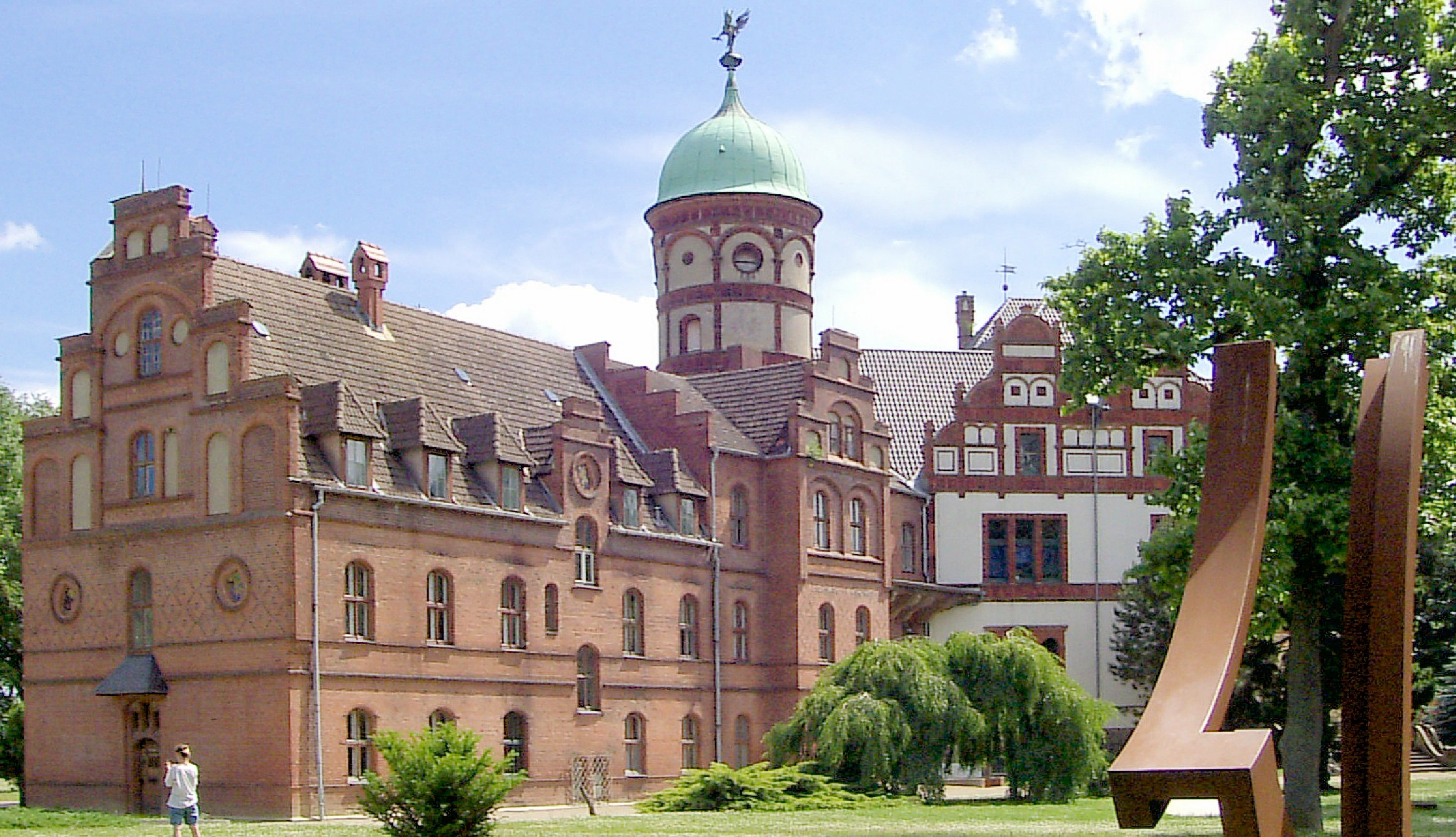 Schloss Wiligrad, Lübstorf, Deutschland